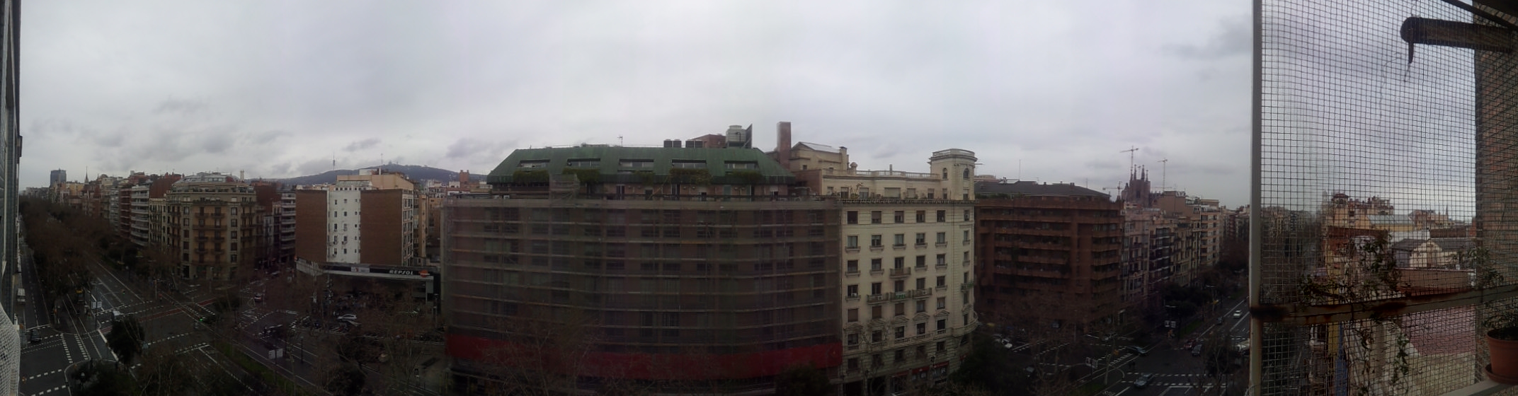 Panoràmica de l'Avinguda Diagonal a l'alçada de la Plaça Jacint Verdaguer un dia de pluja. Es pot veure Collserola i la Sagrada Família.